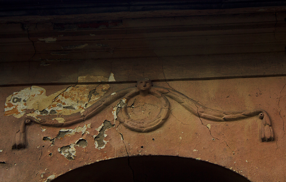 Декор однієї з башт палацу Телекі